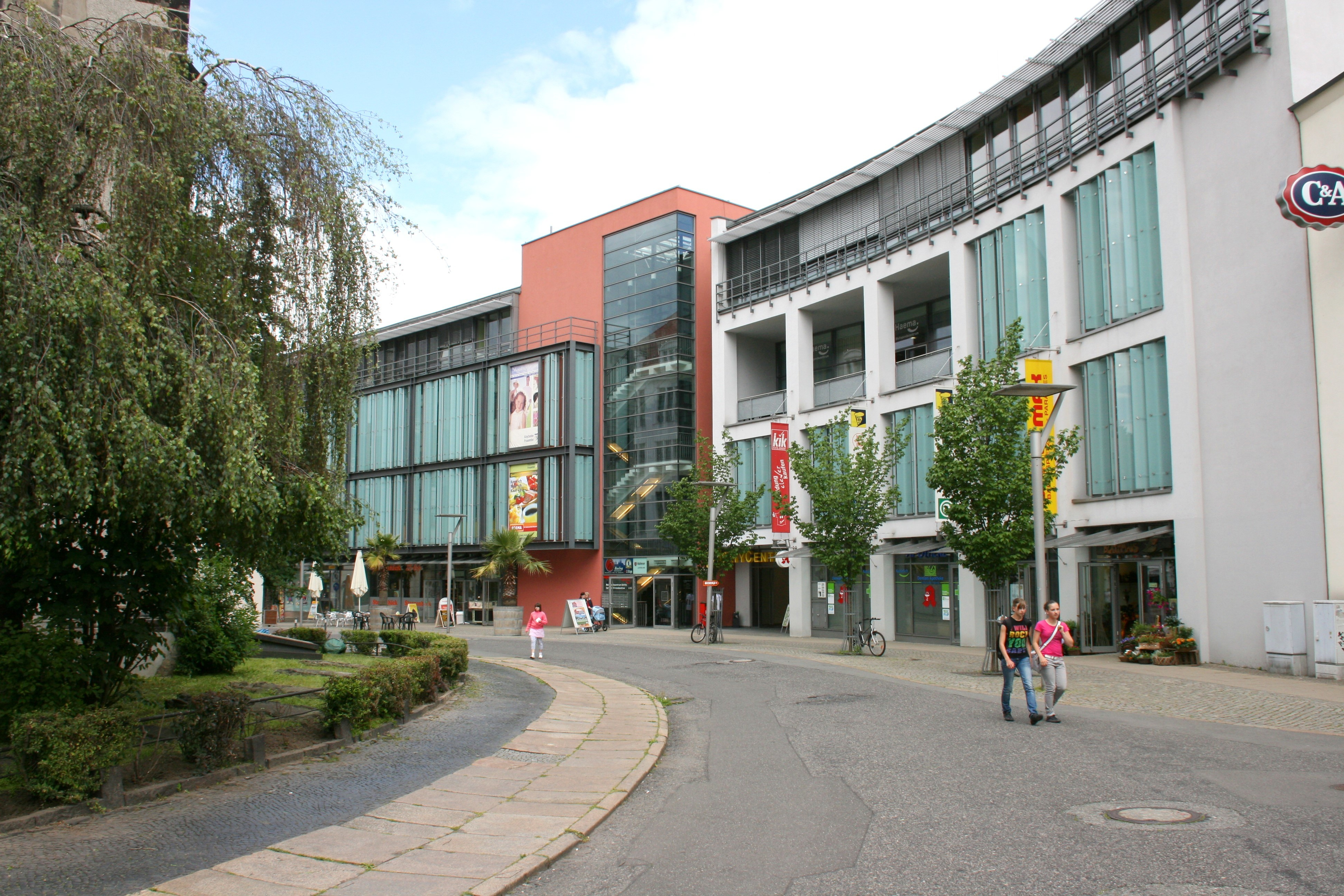 City-Center, An der Frauenkirche in Görlitz